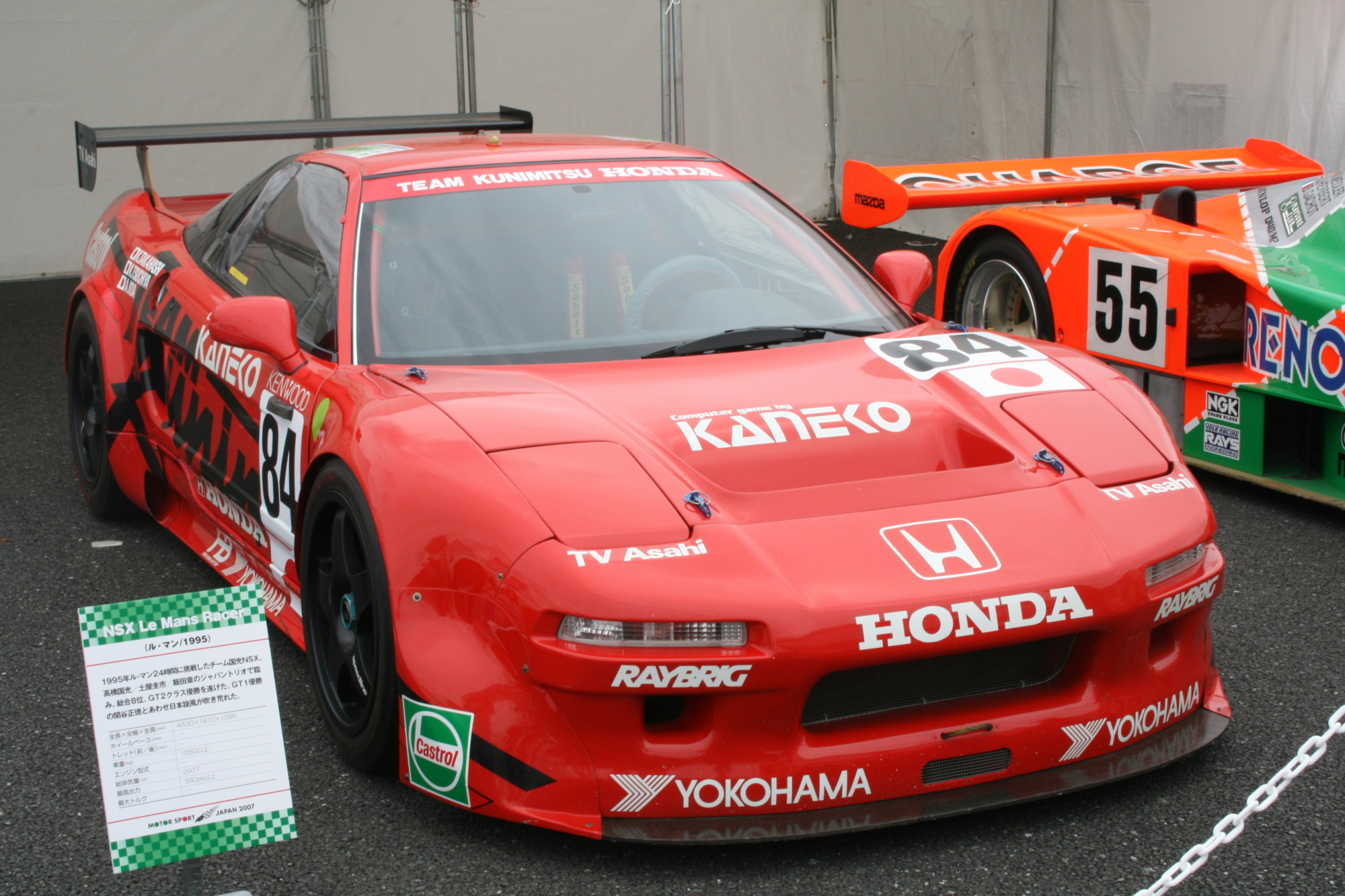 Honda NSX